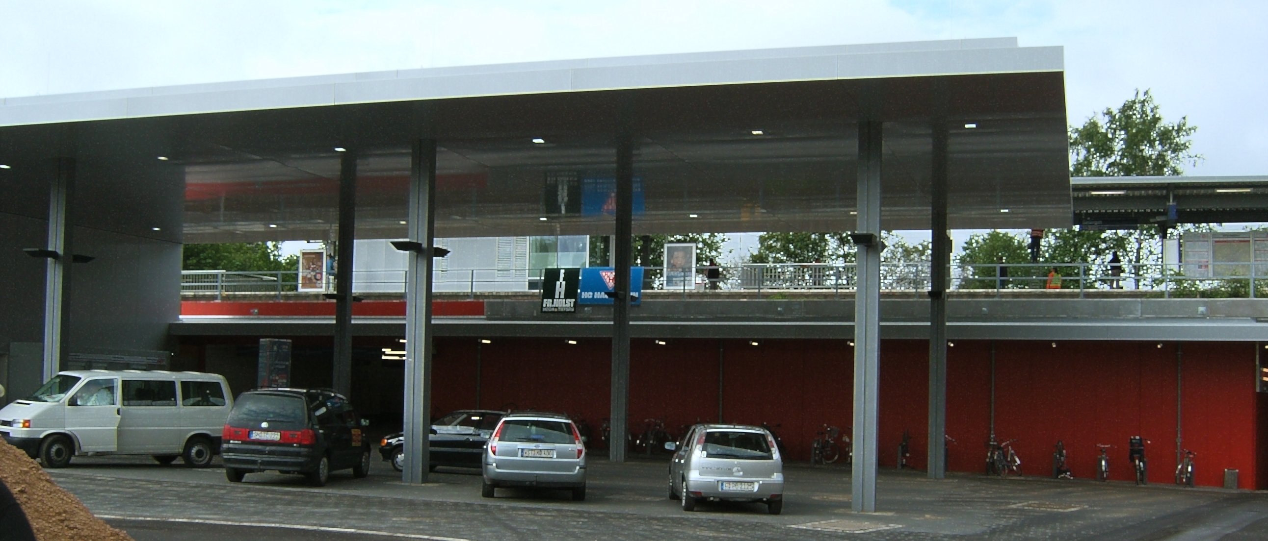 Bildbeschreibung: Hamburg, Stellingen, S-Bahnhof Fotograf: selbst Datum: 31.5.2006